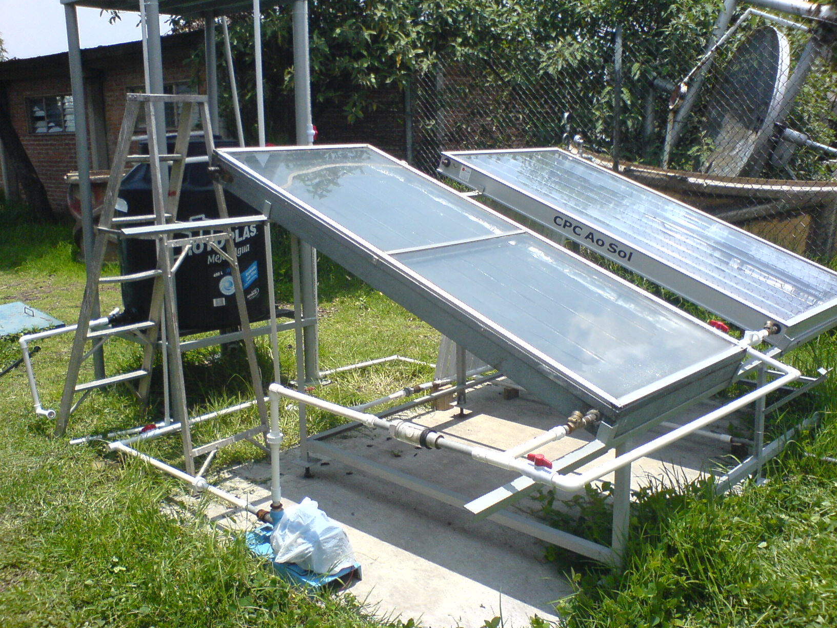 Calentador solar activo. Se puede apreciar el contenedor, dos módulos, la bomba y el sistema de tuberías. Asimismo se puede ver la inclinación de los módulos con respecto al suelo horizontal.